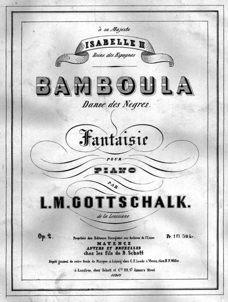 Affiche pour un spectacle musical "Bamboula" par Louis Moreau Gottschalk.